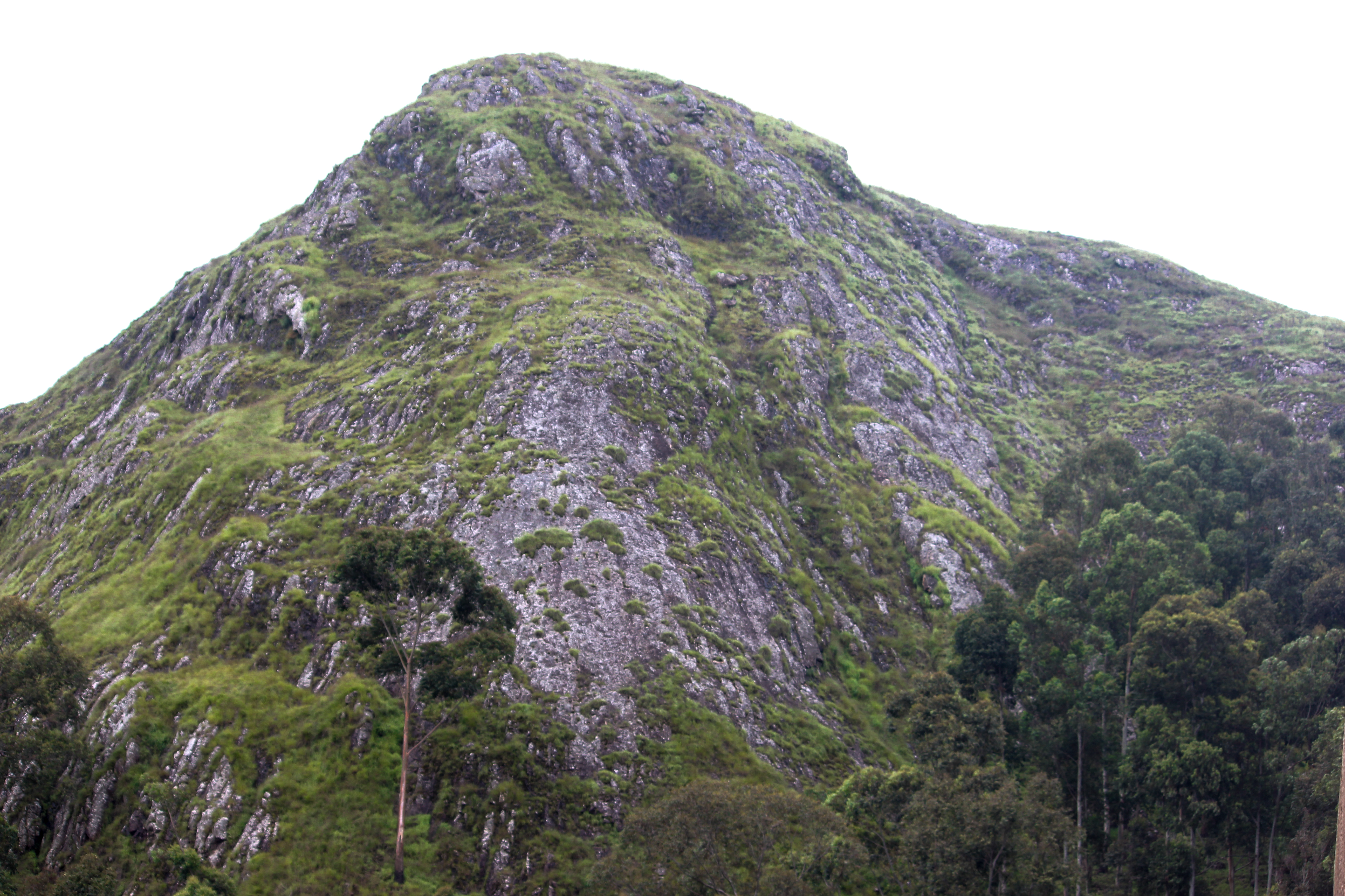 Legend to the people of Ntubaw in the donga and mating division.